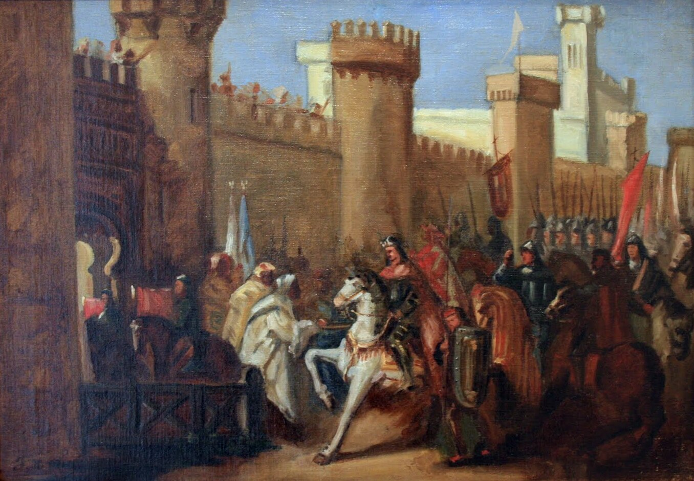 Imagen del cuadro de Mauricio Federico Ramos (1846-1904), que representa la Entrada de Jaime I en Murcia en 1266, después de que las autoridades musulmanas capitularan. La pintura está datada en 1876.